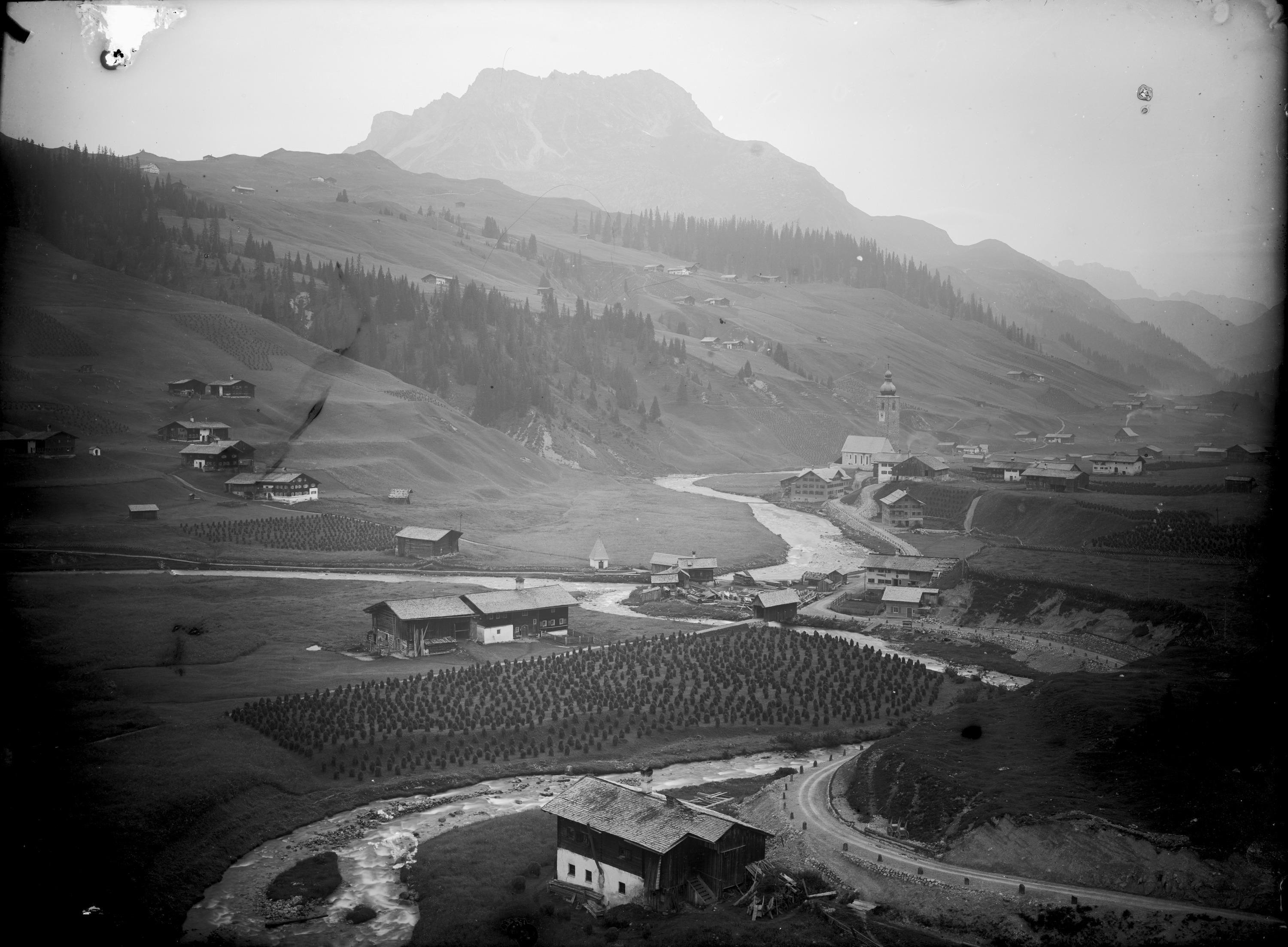 Landwirtschaft, Heutrocknung mit Heinzen